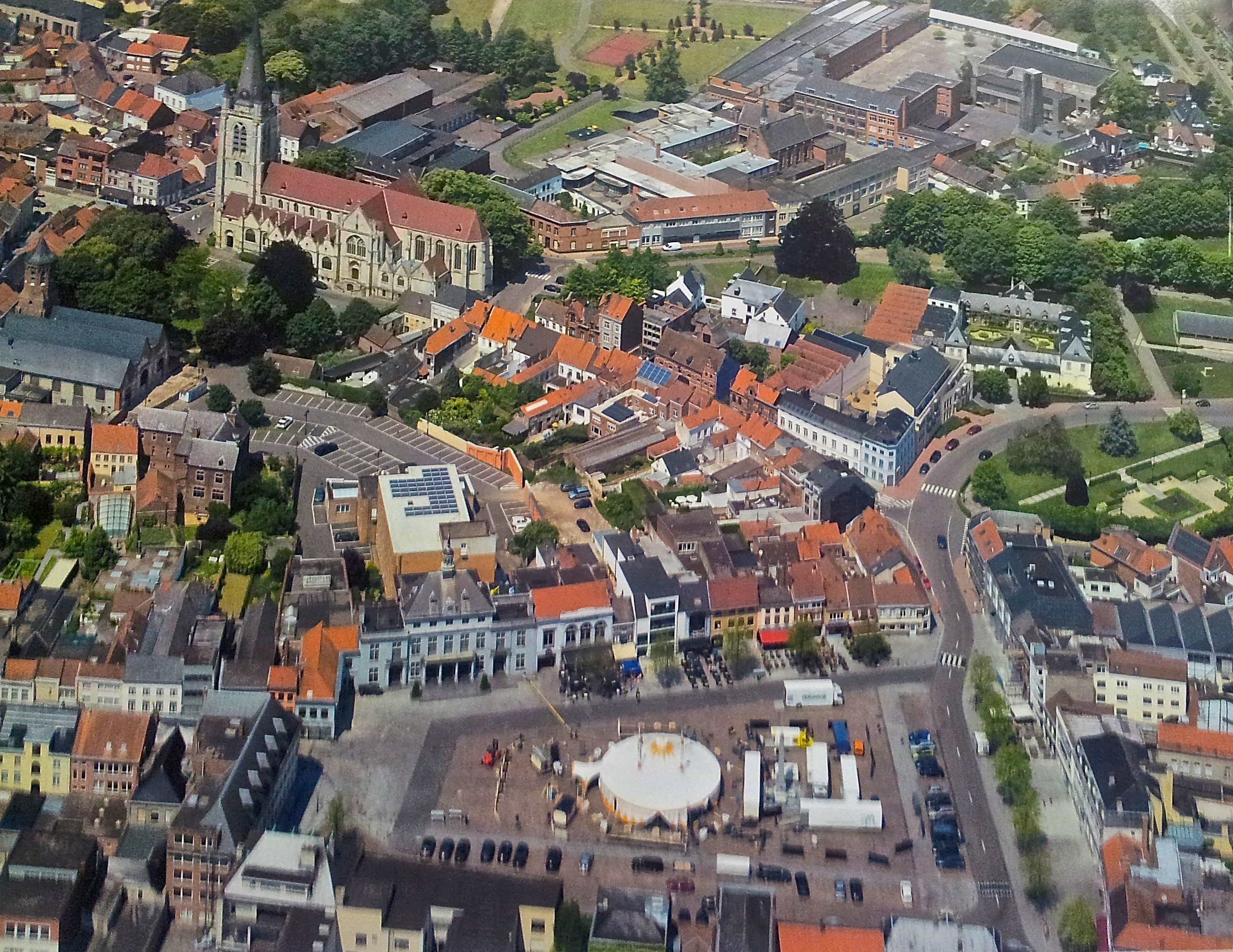 Luchtfoto van Ronse, op de voorgrond Grote Markt en Sint-Hermeskerk